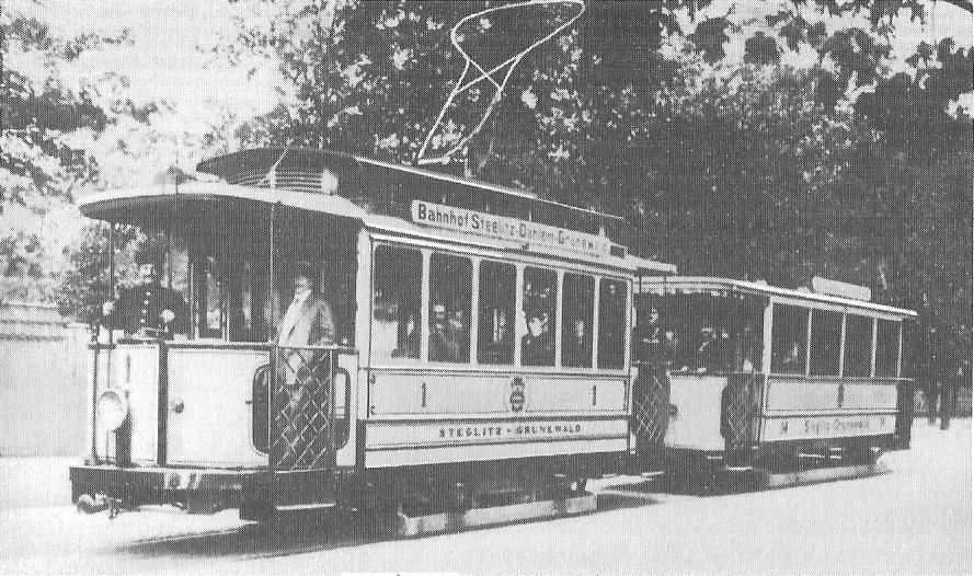 Triebwagen 1 und Beiwagen 14 der Straßenbahn der Gemeinde Steglitz am Grunewaldgatter in Dahlem